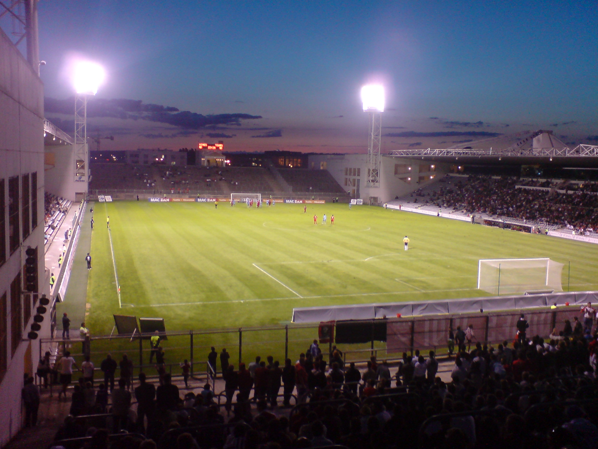 Photo du match Nîmes-Tours le 12 septembre 2008, prise depuis le pesage Est du Stade des Costières